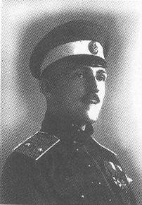 Туркул А.В.